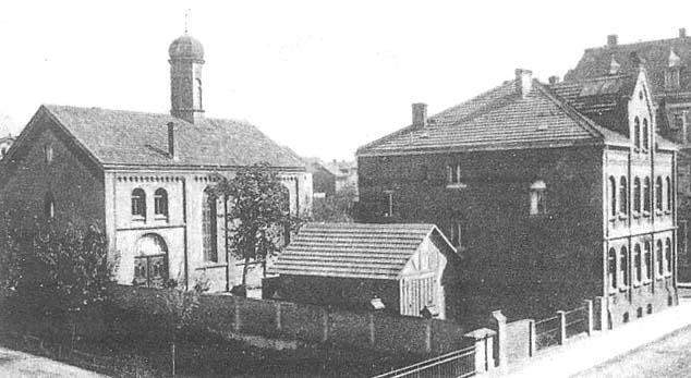 Synagoge in Bad Hersfeld (Links) und rechts Schulhaus mit Mikwe.